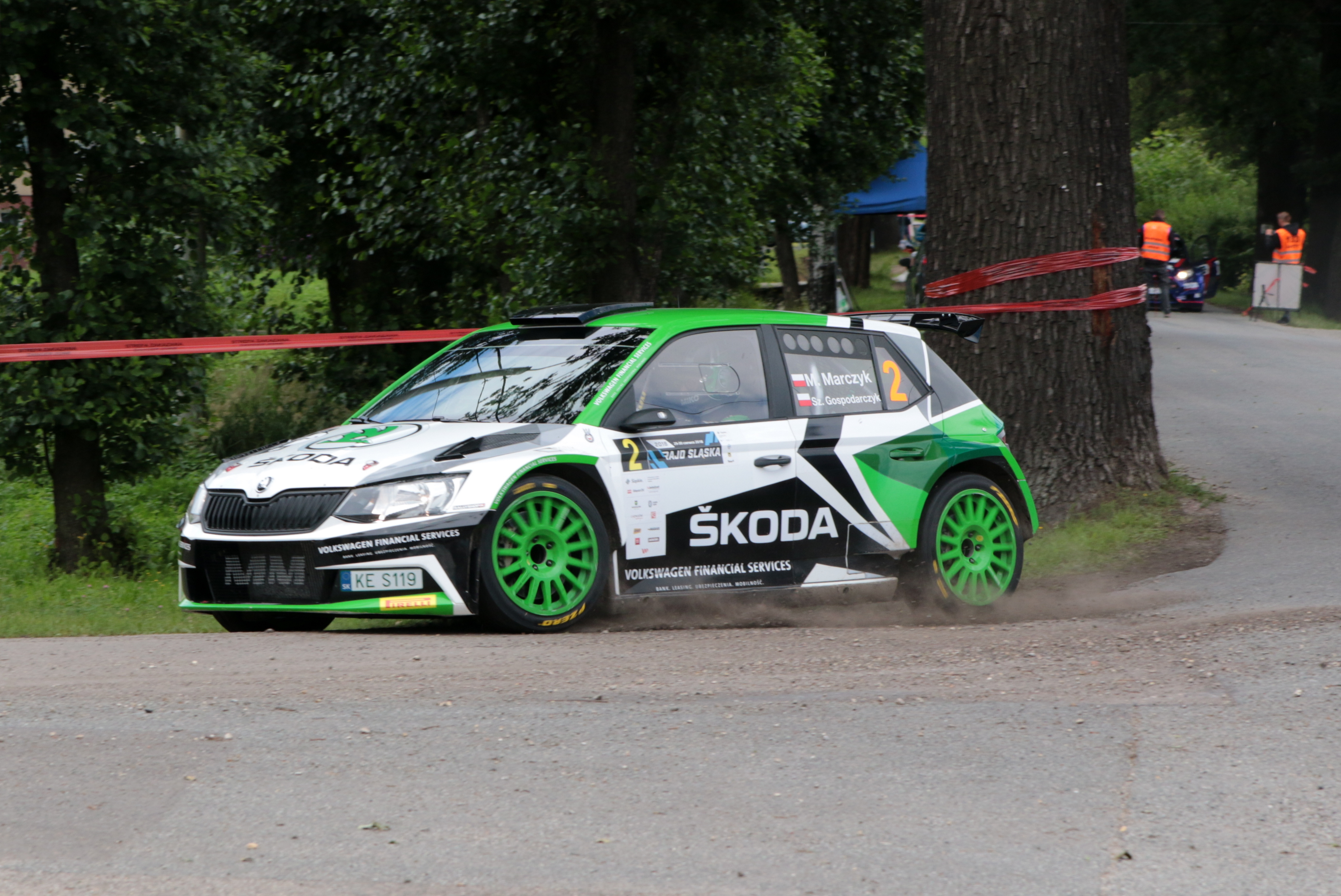 Mikołaj Marczyk podczas Rajdu Śląska 2018, 7OS